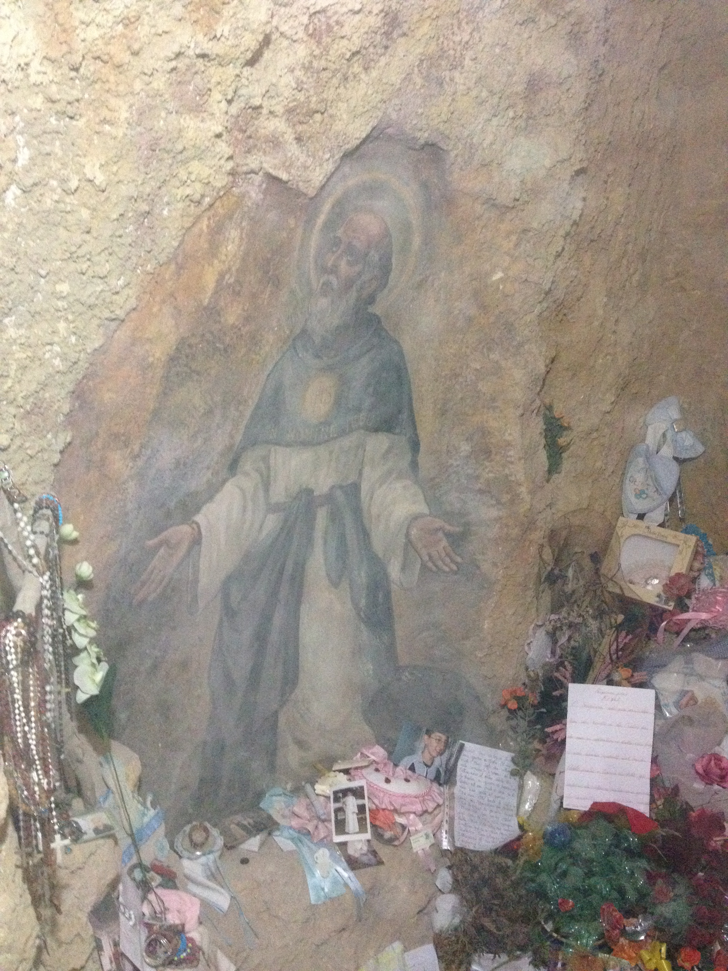 L'affresco posto dentro la grotta dove ha vissuto San Calogero a Naro raffigurante il Santo inginocchiato in preghiera.